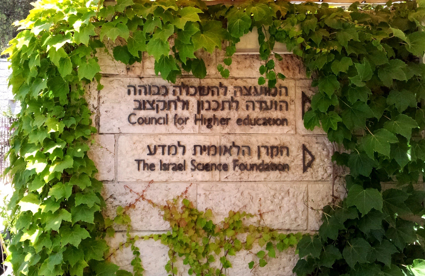 שלט בכניסה לבנייני המועצה להשכלה גבוהה והקרן הלאומית למדע, ירושלים